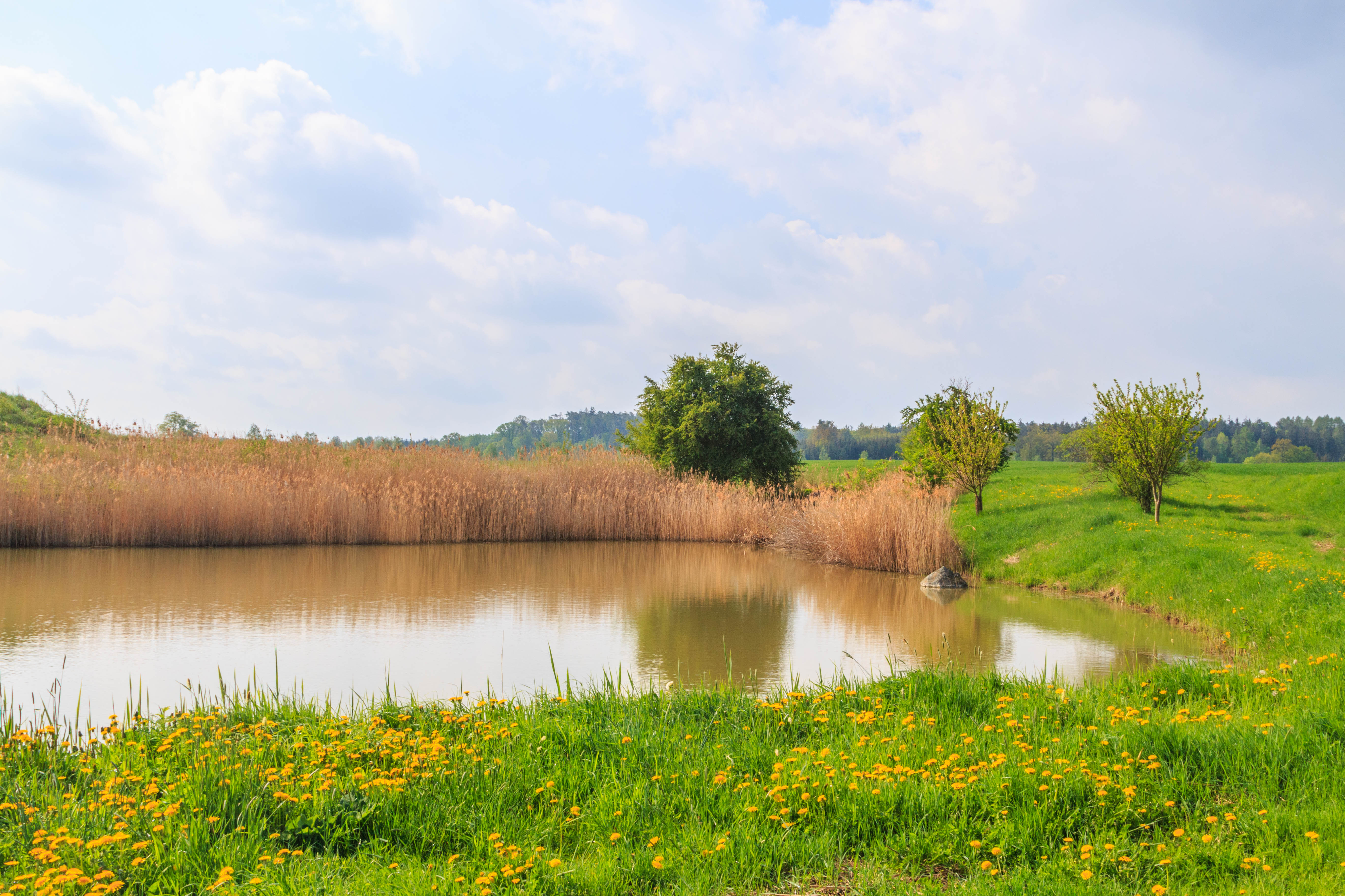 Rybníček u Podhorek Project: Vodstvo.